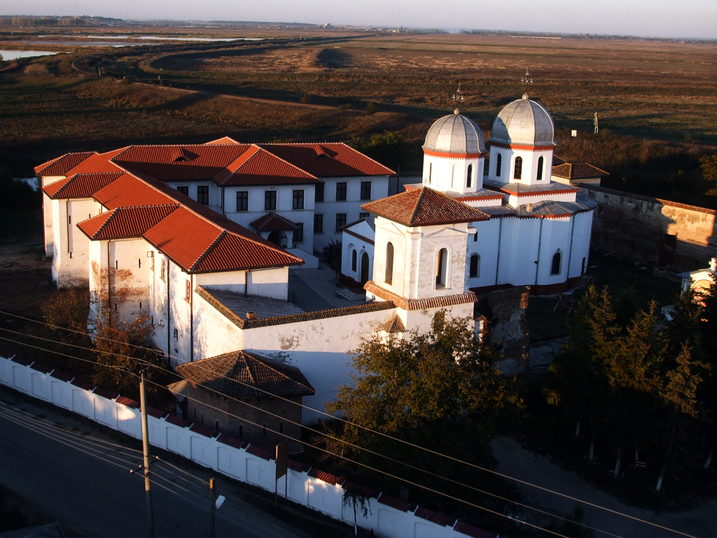 Manastirea Comana, locul unde este inmormantat Vlad Tepes